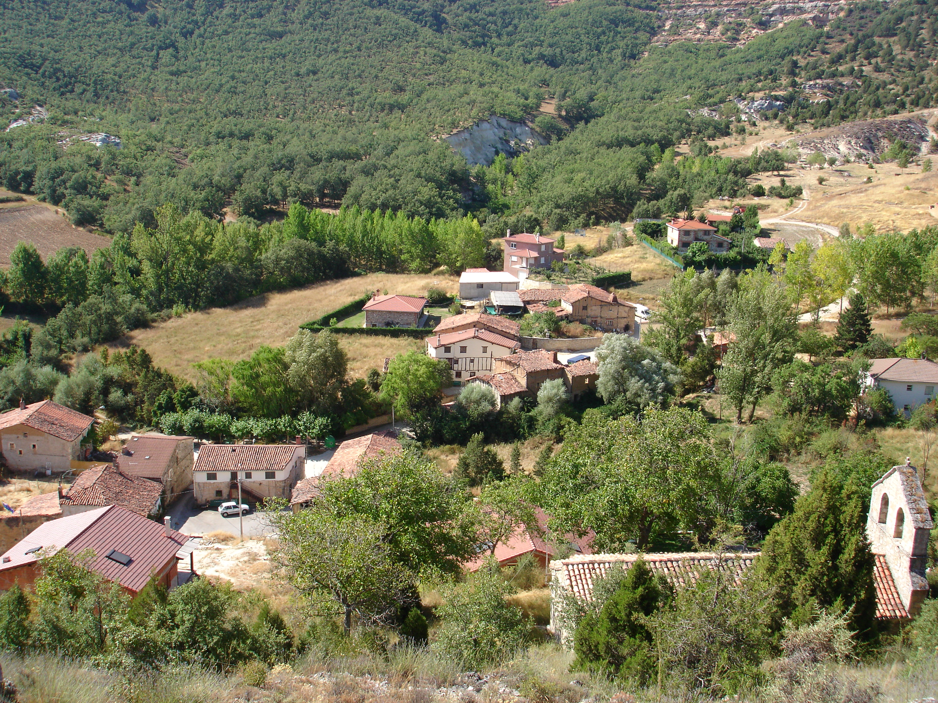 Panorámica del pueblo de Barriosuso, visto desde el alto de la Iglesia de San Pelayo.